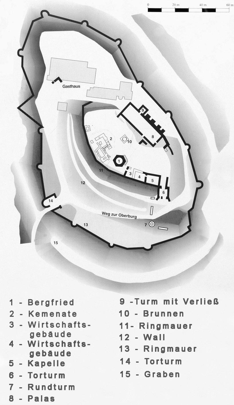 Grundriss von Burg Lichtenberg, aufgenommen von der öffentliche aufgestellten Bildtafel vor der Burg